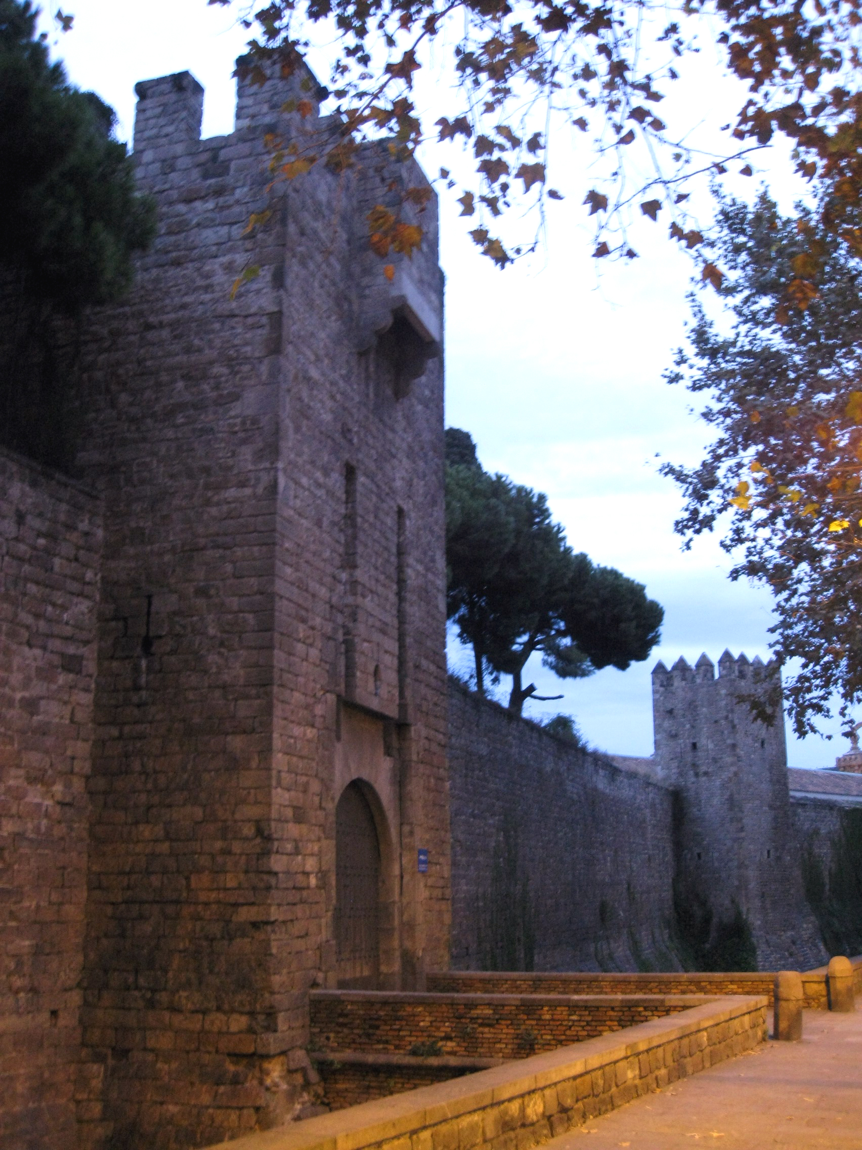 Portal de Santa Madrona (Barcelona)